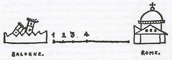 Dessin expliquant le processus de la Cristallisation